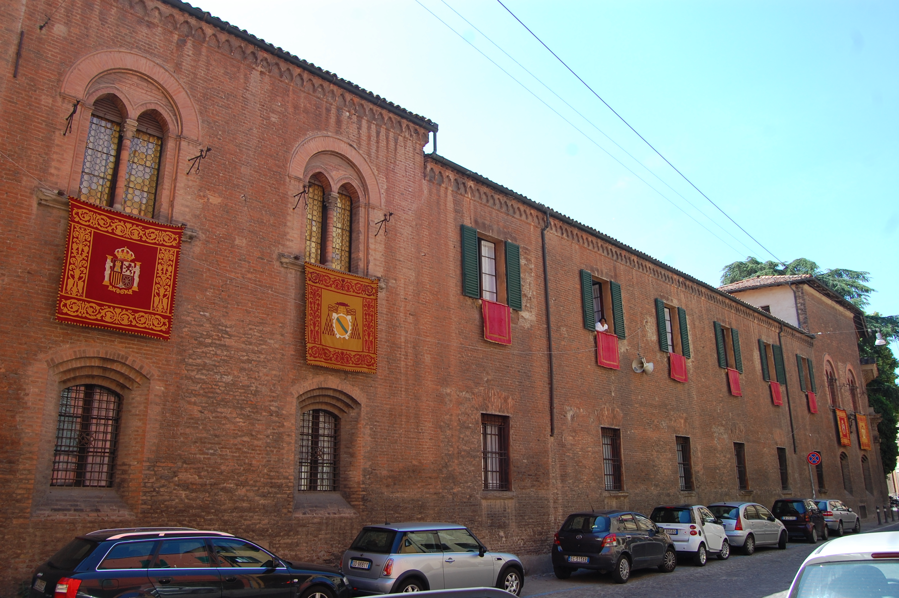 Vista exterior del Real Colegio de España en Bolonia el día de la fiesta de la Madonna di San Luca de 2012.